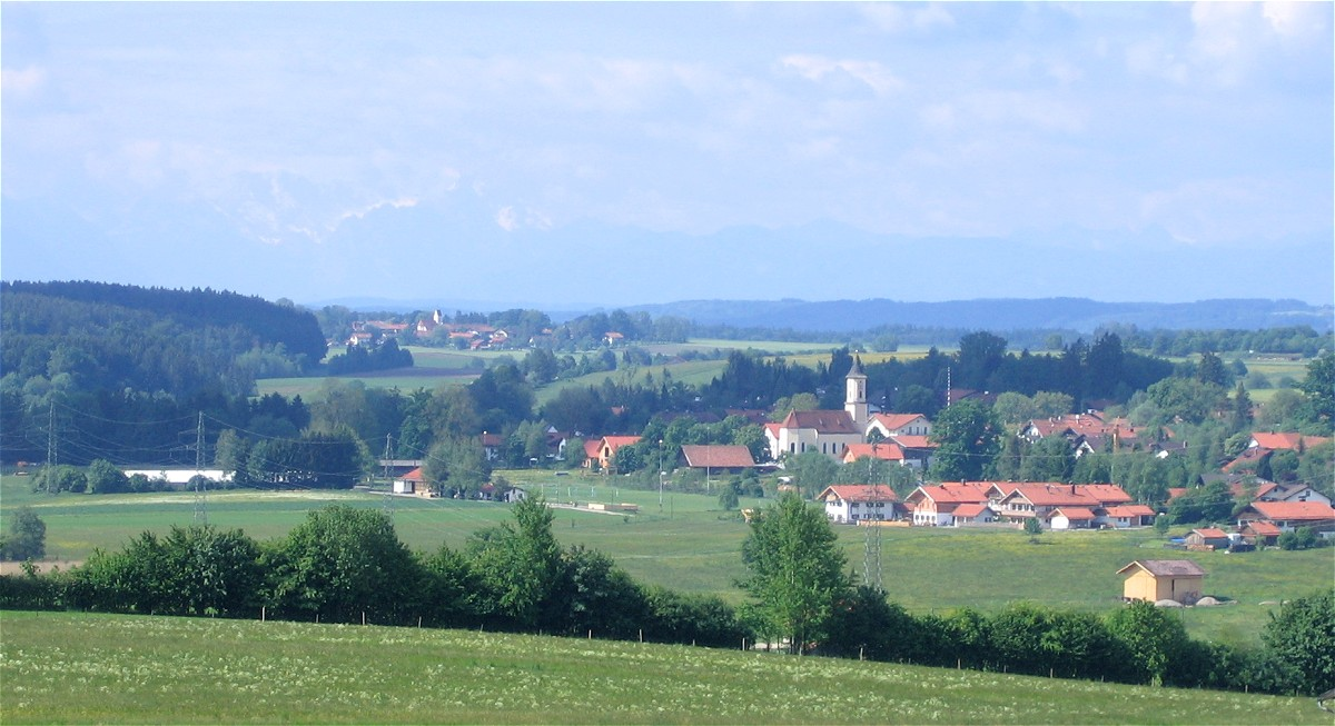 Deining, Ortsteil von Egling, von der Ludwigshöhe gesehen; im Hintergrund Ergertshausen